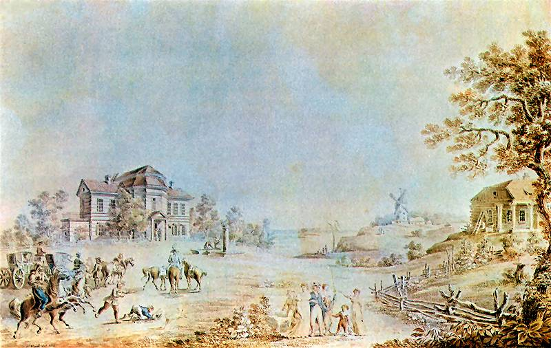 WARSZAWA Widok austerii w Młocinach. 1812. Akwarela. 35,5 x 55,5 cm. Muzeum Narodowe, Warszawa.